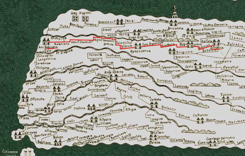 foto adapatada do ficheiro: TabulaPeutingeriana.jpg de Konrad Miller.